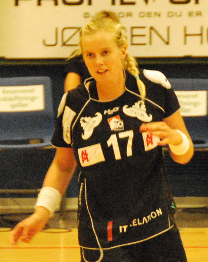 Håndboldspilleren Susan Thorsgaard fra FC Midtjylland Håndbold Her i en kamp mod Viborg HK i Viborg Stadionhal.